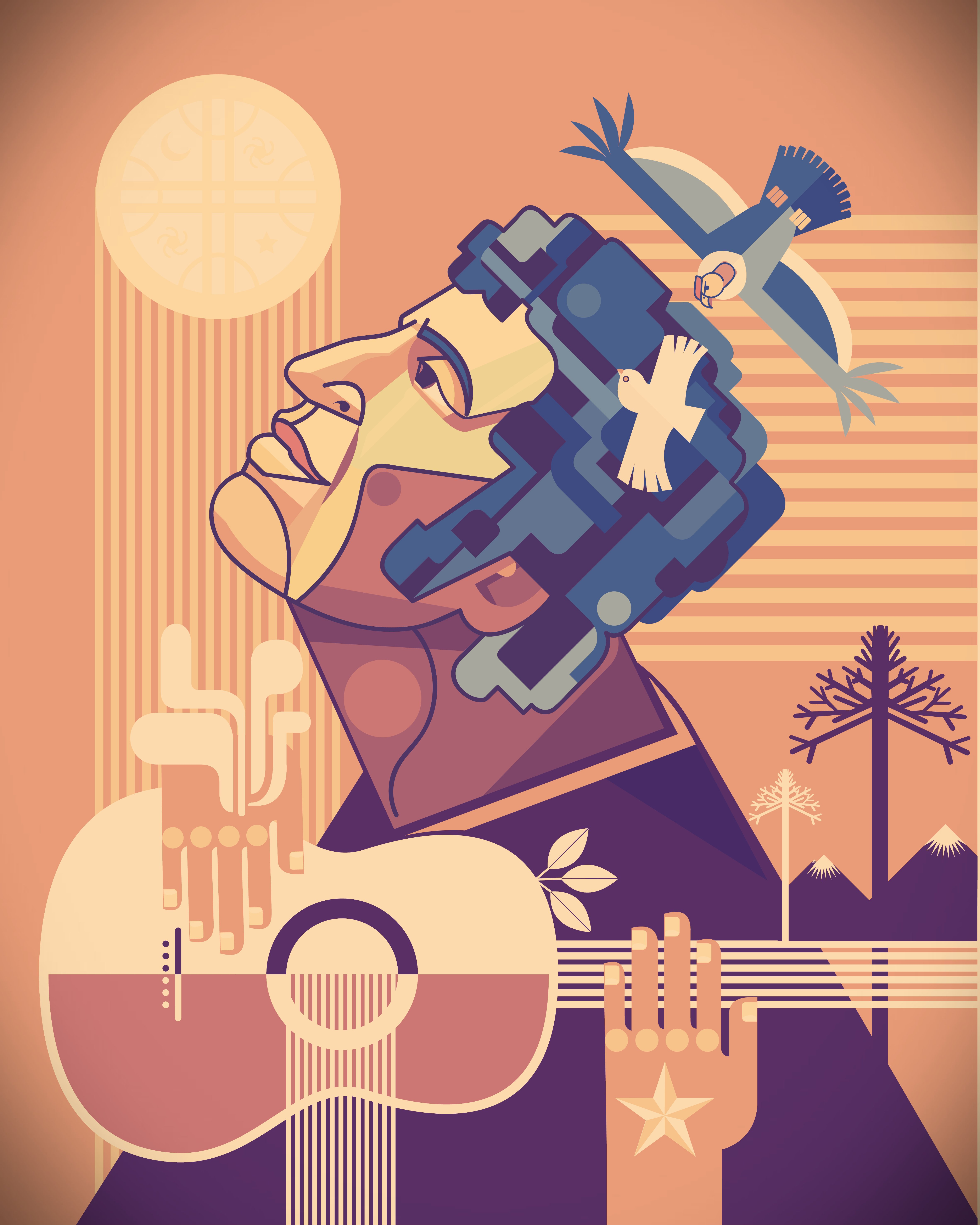 VICTOR JARA-01